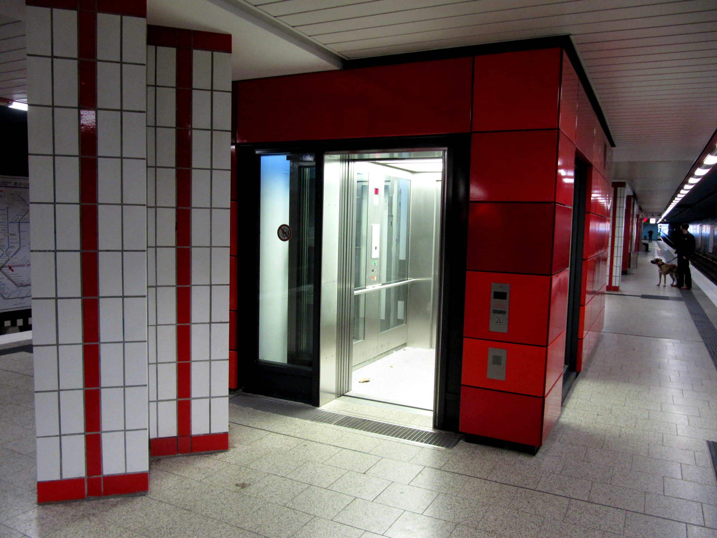 Der neue Fahrstuhl in der U-Bahn-Haltestelle "Burgstraße" in Hamburg.